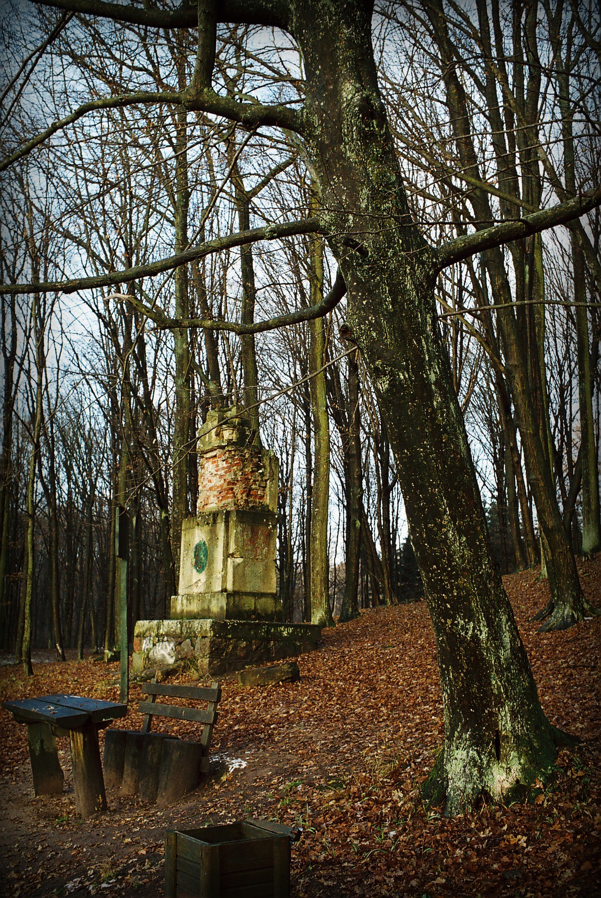 Autor: Adrian Grzegorz Rok utworzenia: 2005